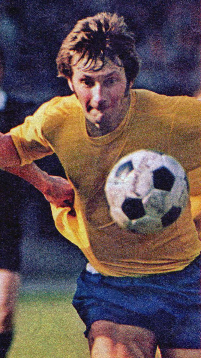 Torino, stadio Comunale, 11 aprile 1973. Il difensore dei Rams, Colin Todd, in azione nella sfida tra Juventus e Derby County (3-1) valevole per la semifinale di andata della Coppa dei Campioni 1972-73; nell'occasione i Rams indossarono la loro divisa di cortesia gialloblù.